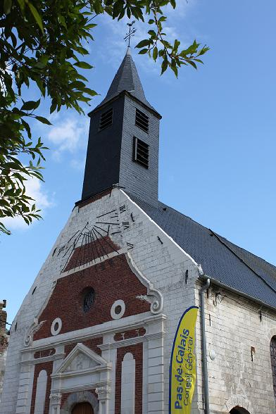 Eglise de Frévillers. Pignon baroque.